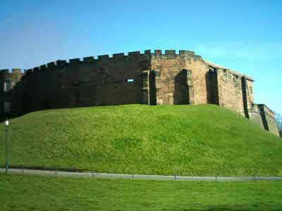 webmaster